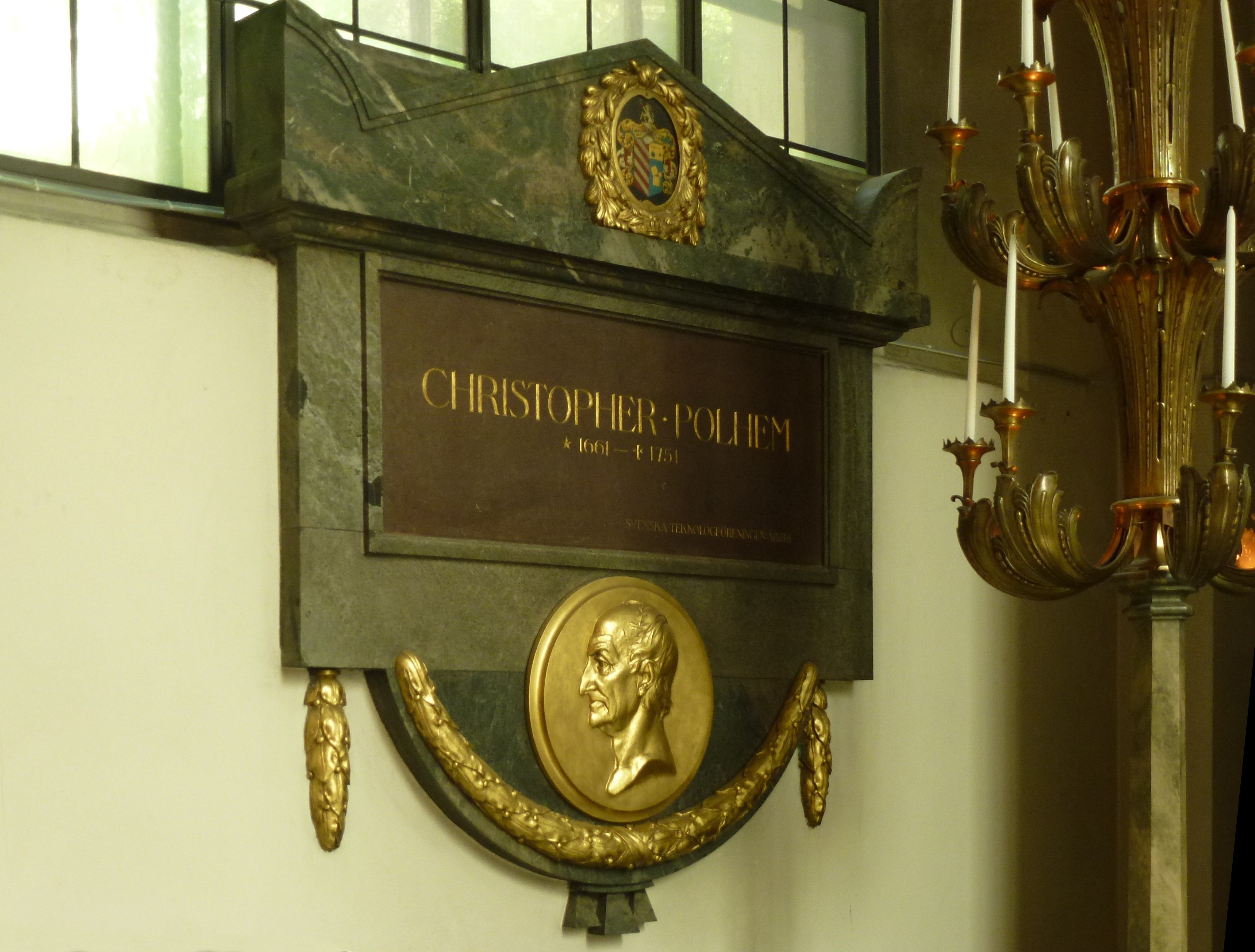 Maria Magdalena kyrka, minnestavla över Christopher Polhem